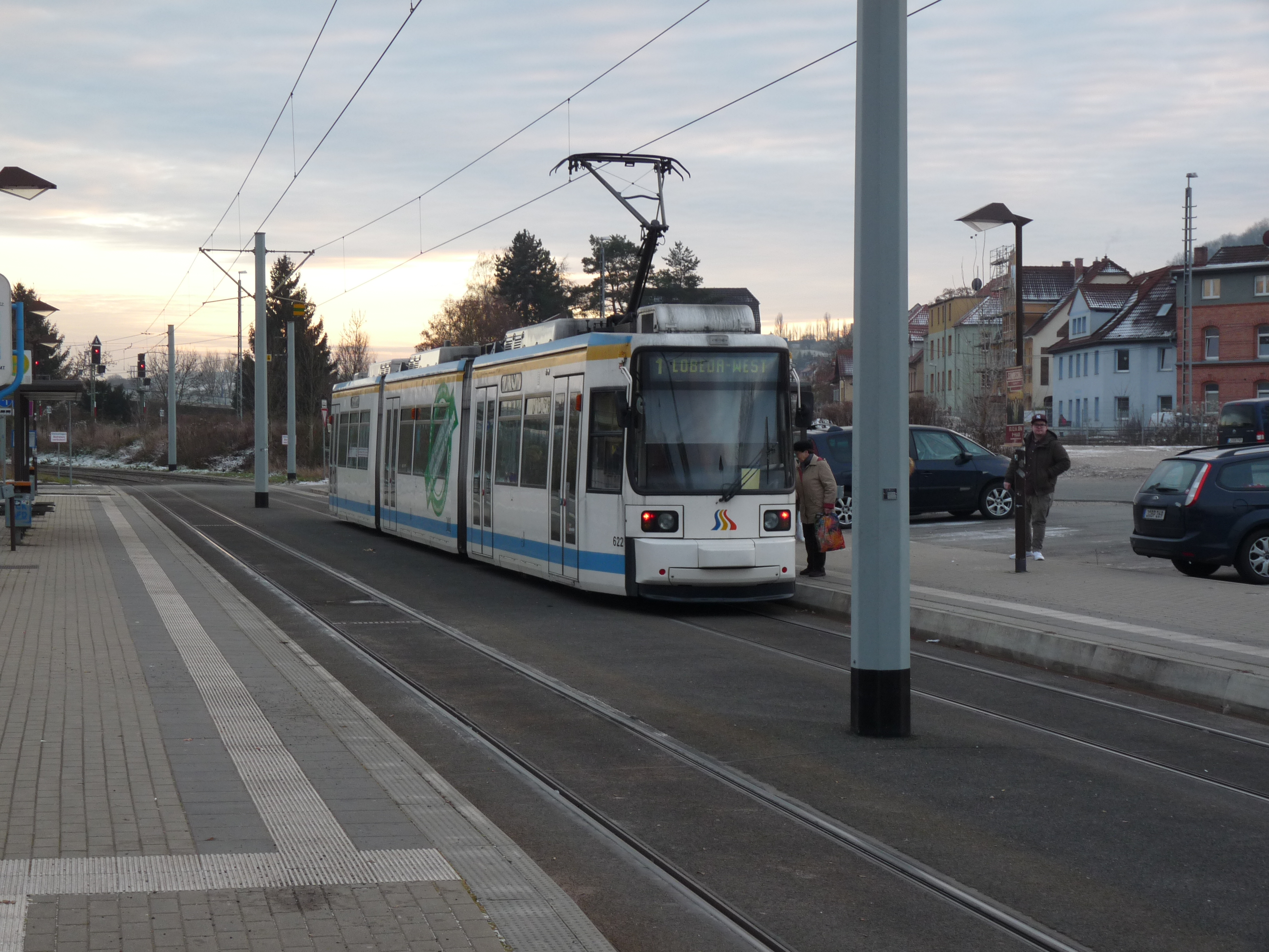 De tram van Jena bij het station